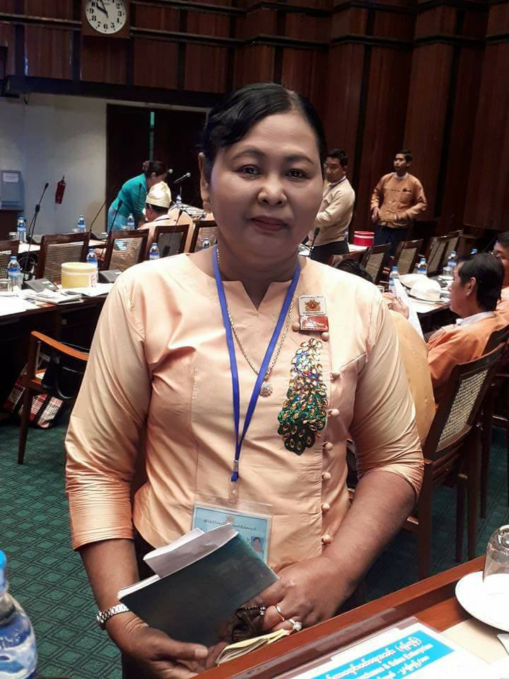 မြန်မာဘာသာ: ဒေါ်သစ်သစ်မြင့် ကို ရန်ကုန်တိုင်းဒေသကြီးလွှတ်တော်တွင်တွေ့ရစဥ်